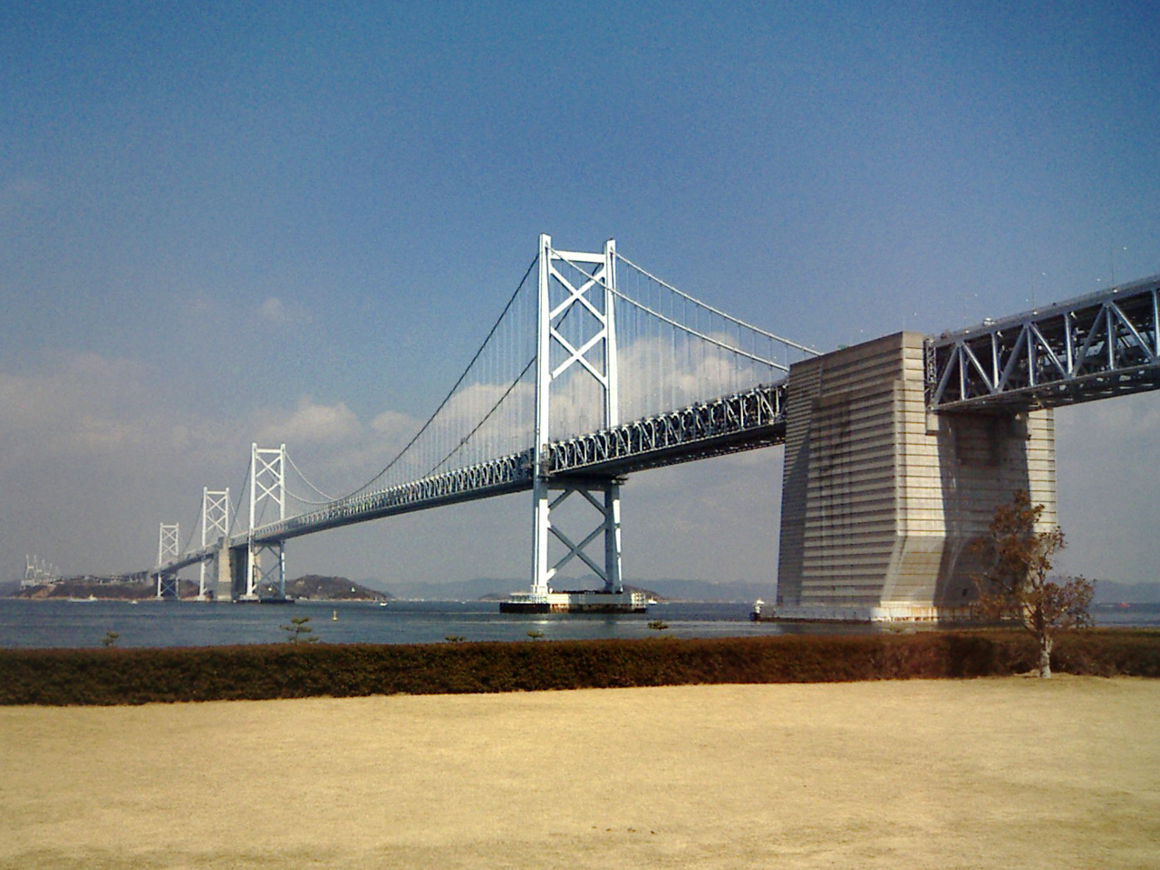 南備讃瀬戸大橋 - 日本国（瀬戸内海に架かる瀬戸大橋の一つ。）瀬戸大橋記念公園から撮影。